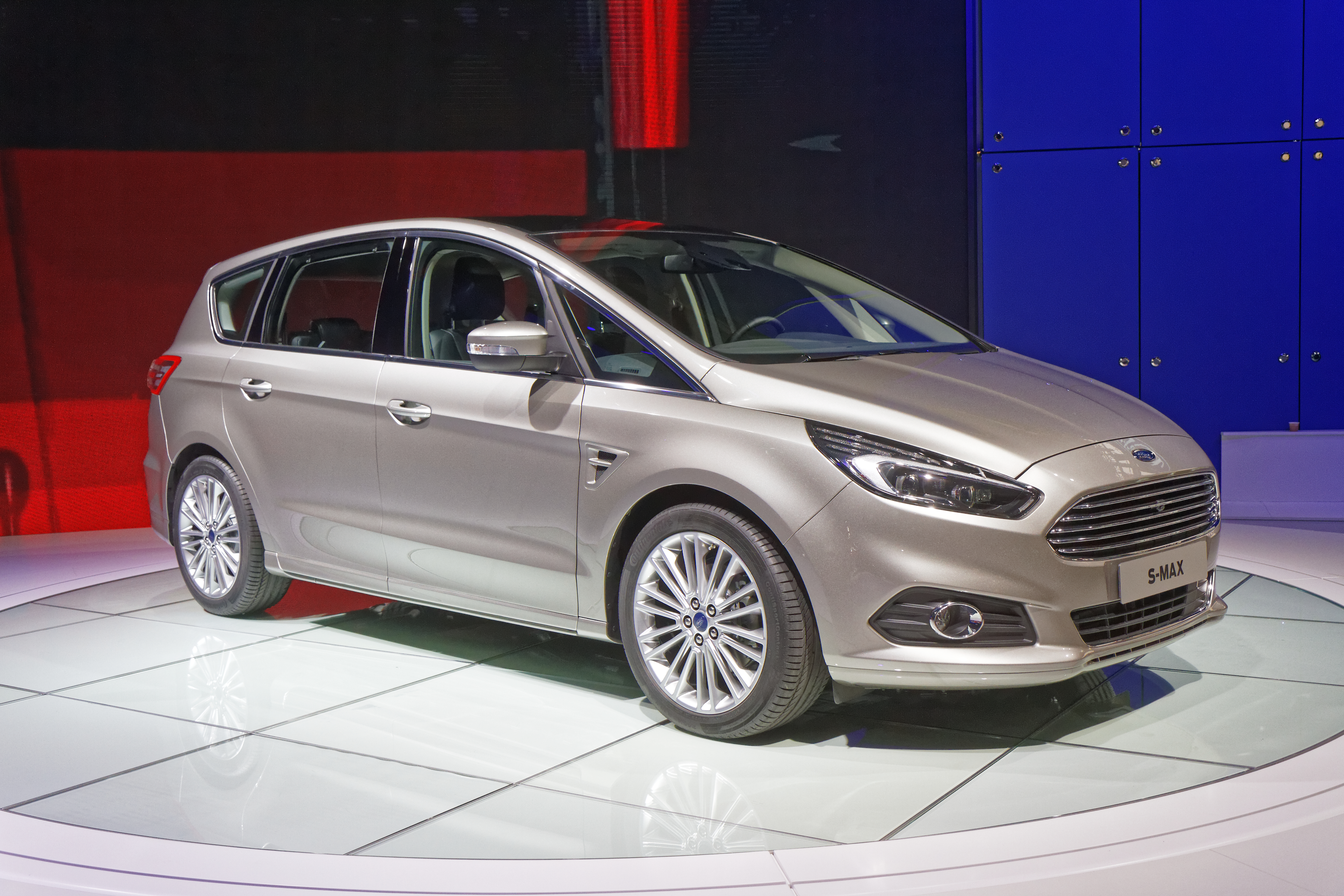 Une Ford S-Max présentée lors du mondial de l'automobile de Paris 2014.